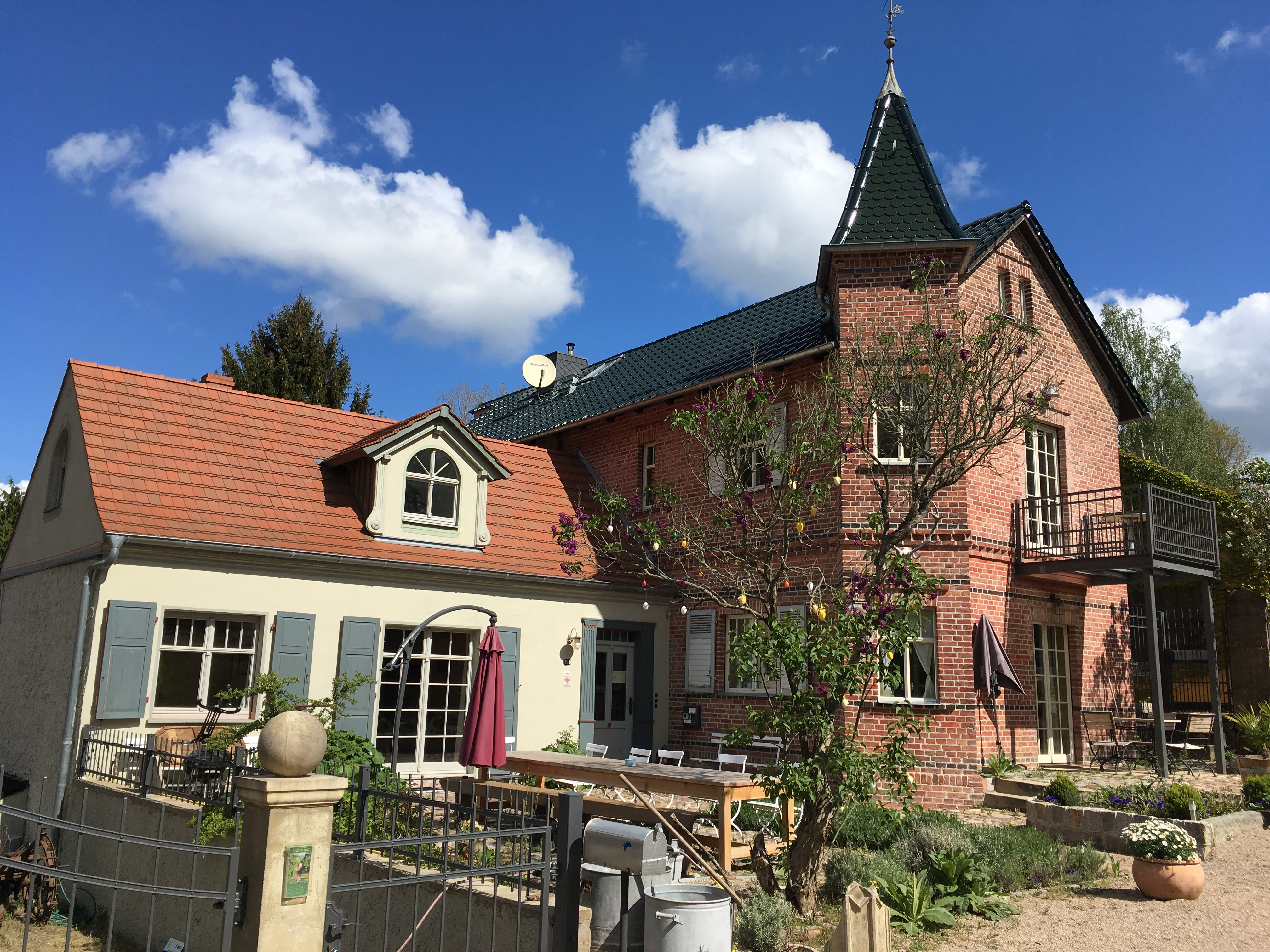 Hermannsmühle, ein denkmalgeschütztes Ensemble in Treuenbrietzen-Bardenitz in Brandenburg